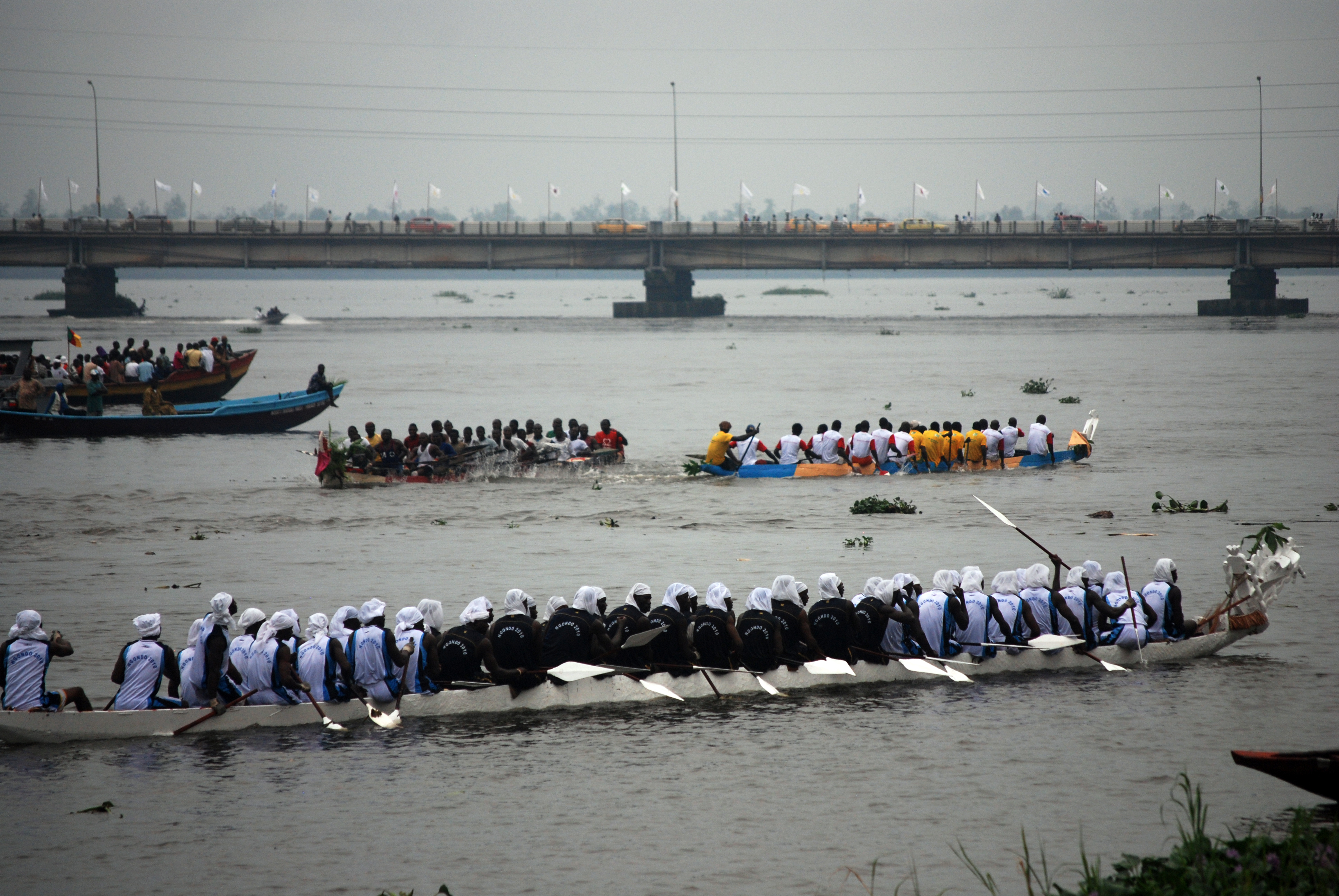 Course de pirogues sur le fleuve Wouri à Douala au Cameroun. This is an image with the theme "Africa on the Move or Transport" from: Cameroon